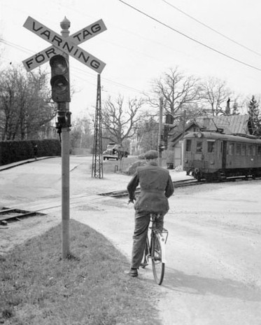 En cyklist väntar på att ett djursholmståg skall pasera övergången vid Djursholms Sveavägen.